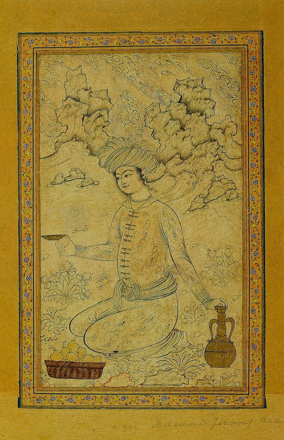 Мухаммад Юсуф. Юноша с чашей 1655-56